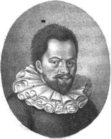 Portret van Simon Stevin